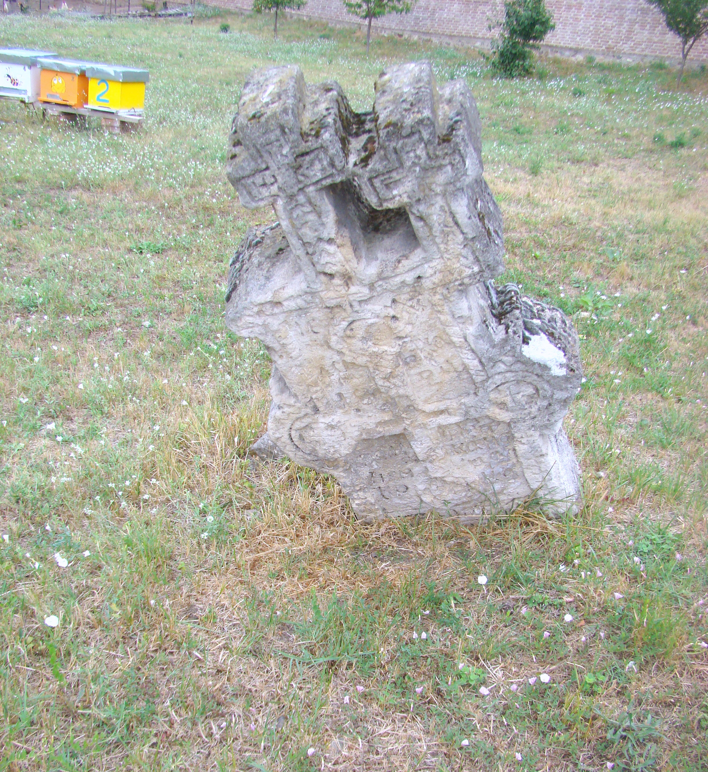 Cruci de piatră, sat Cerneți; comuna Șimian 03